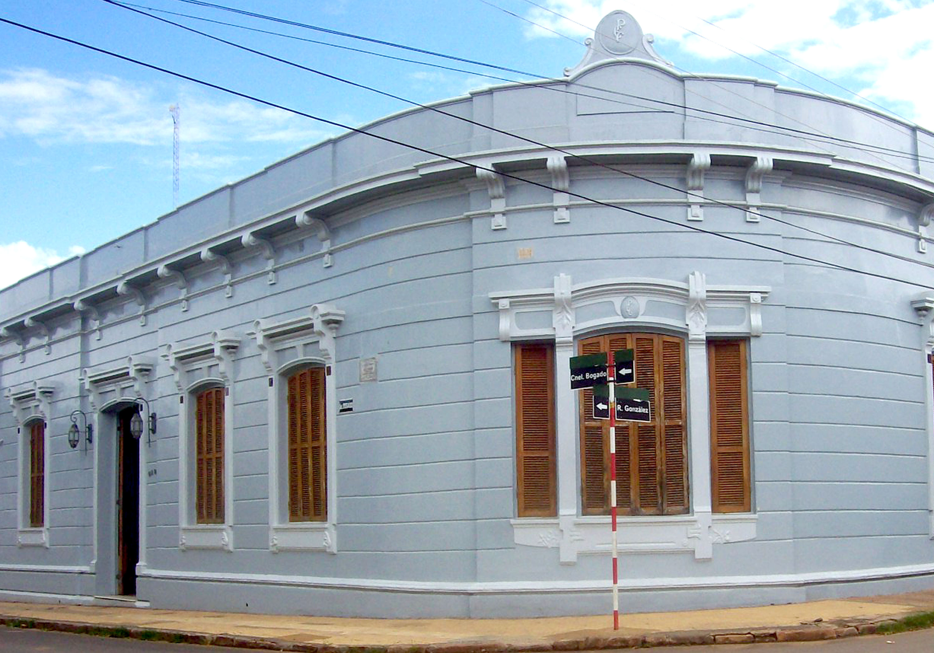 villarrica